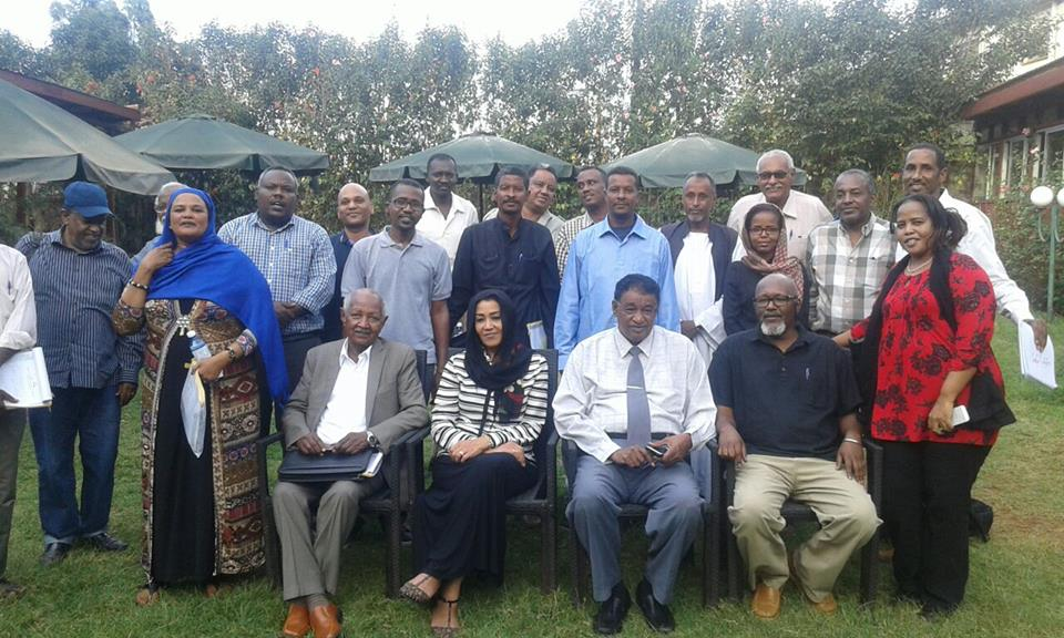 صورة جماعية لبعض المشاركين في إعلان نيروبي